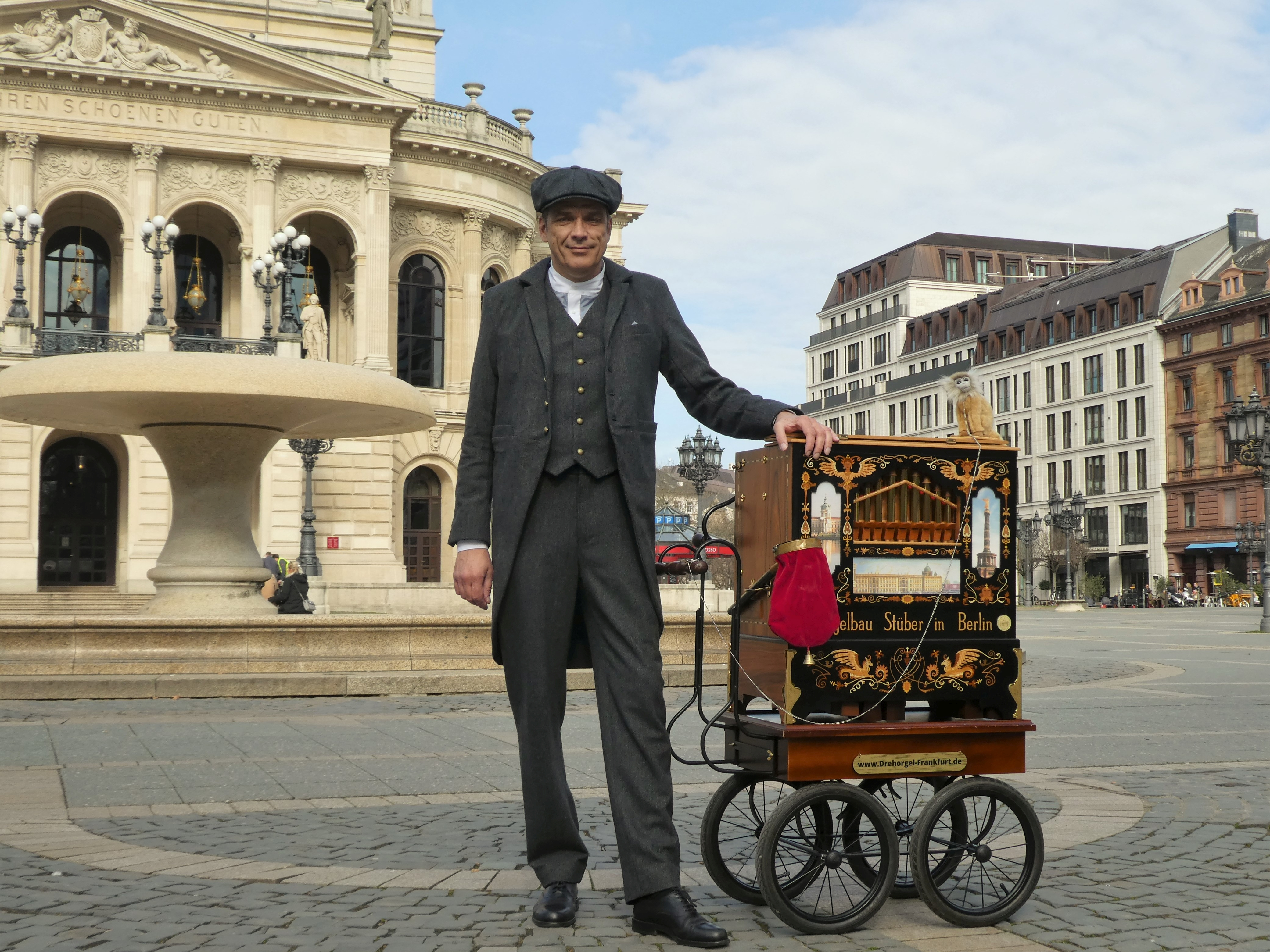 Der Frankfurter Drehorgelmann Markus Schüller vor der Alten Oper in Frankfurt am Main